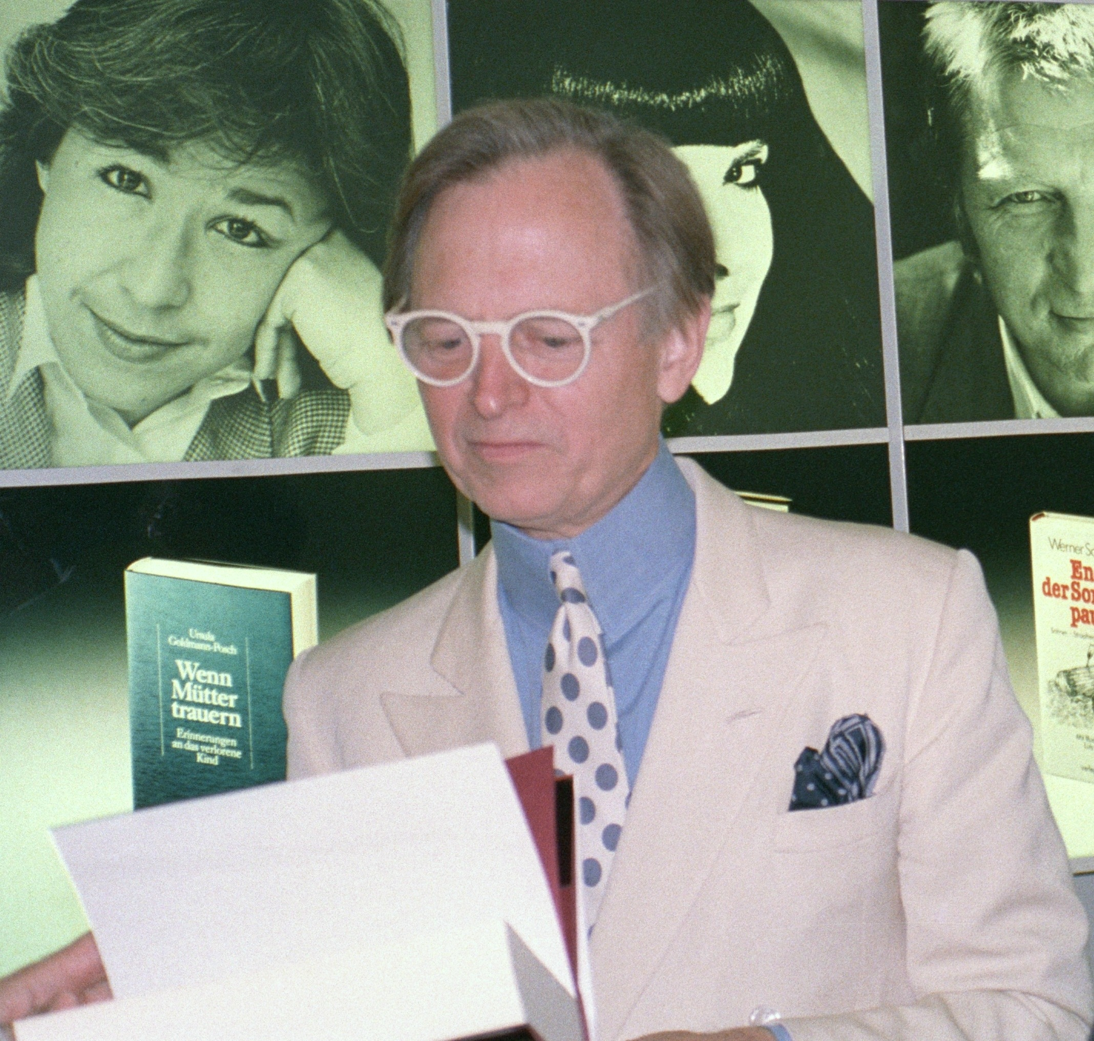 Schriftsteller Tome Wolfe auf der Frankfurter Buchmesse 1988